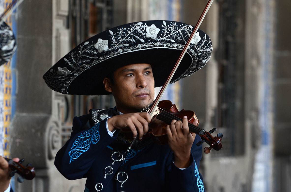 Mariachi en la Ciudad de México.